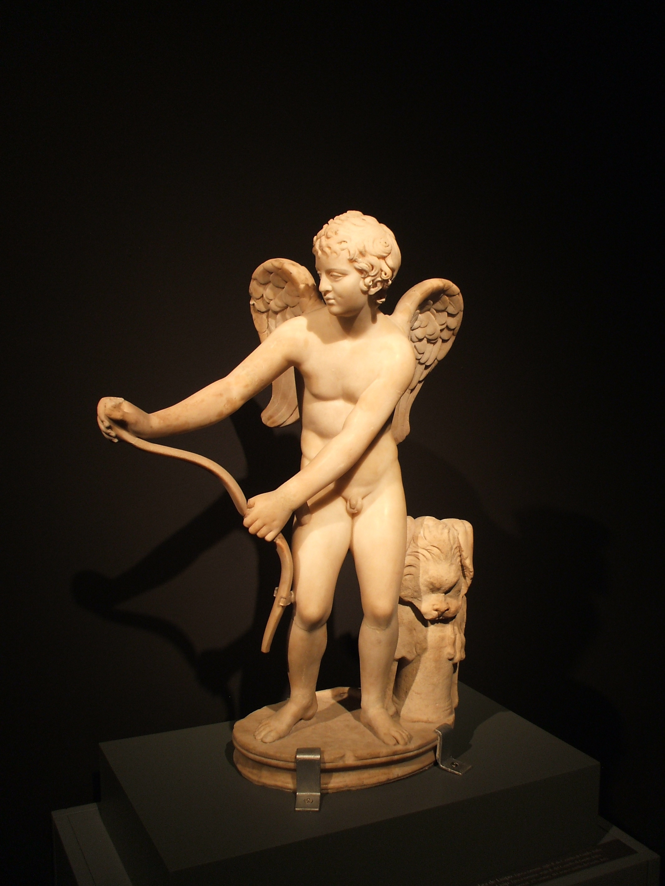 Estatua de Eros tensando el arco, en la exposición La belleza del cuerpo, en el MARQ